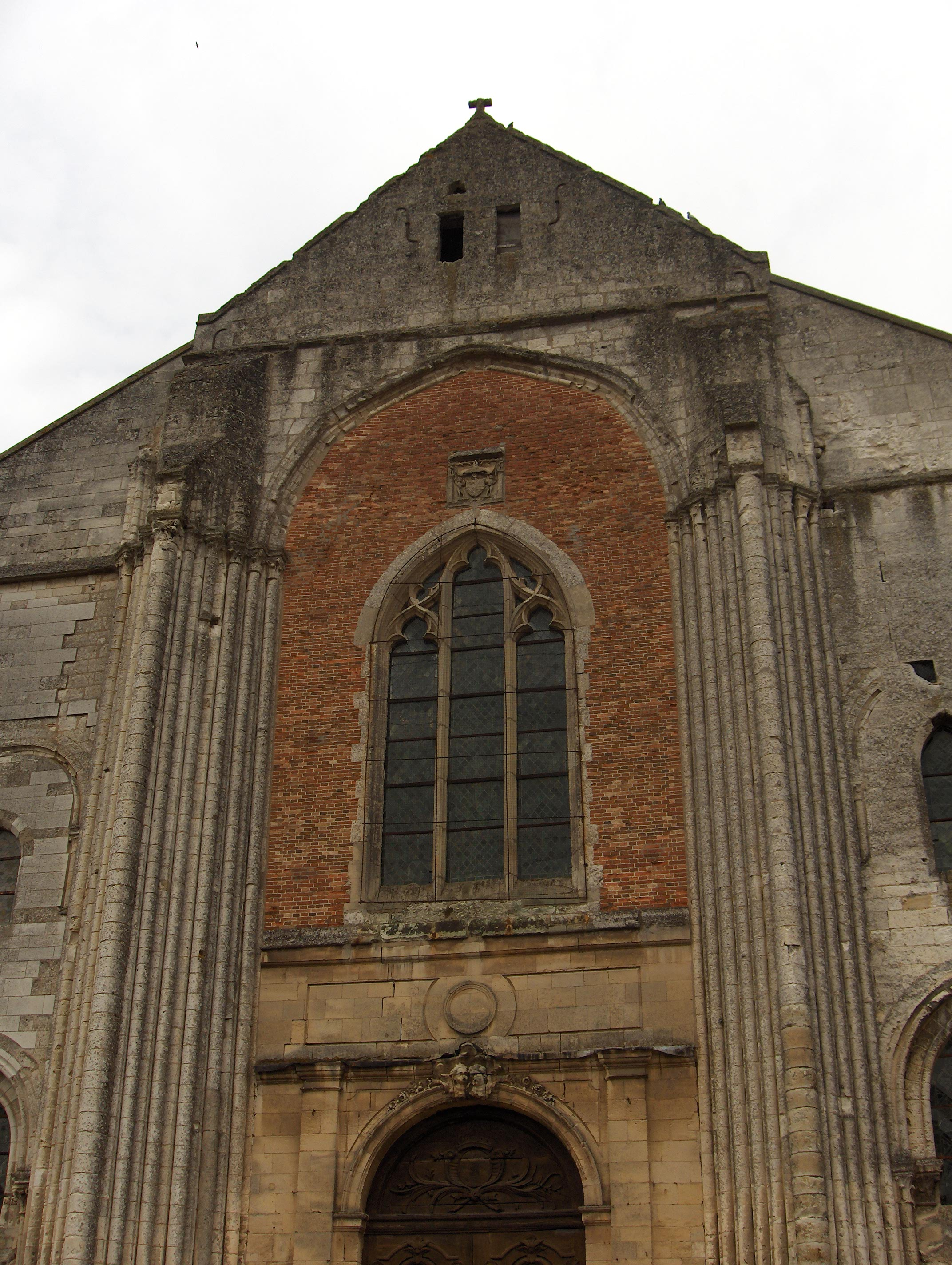 Façade (XVIe siècle) de l'abbaye Saint-Germer-de-Fly dans la commune du même nom dans l'Oise (Picardie)